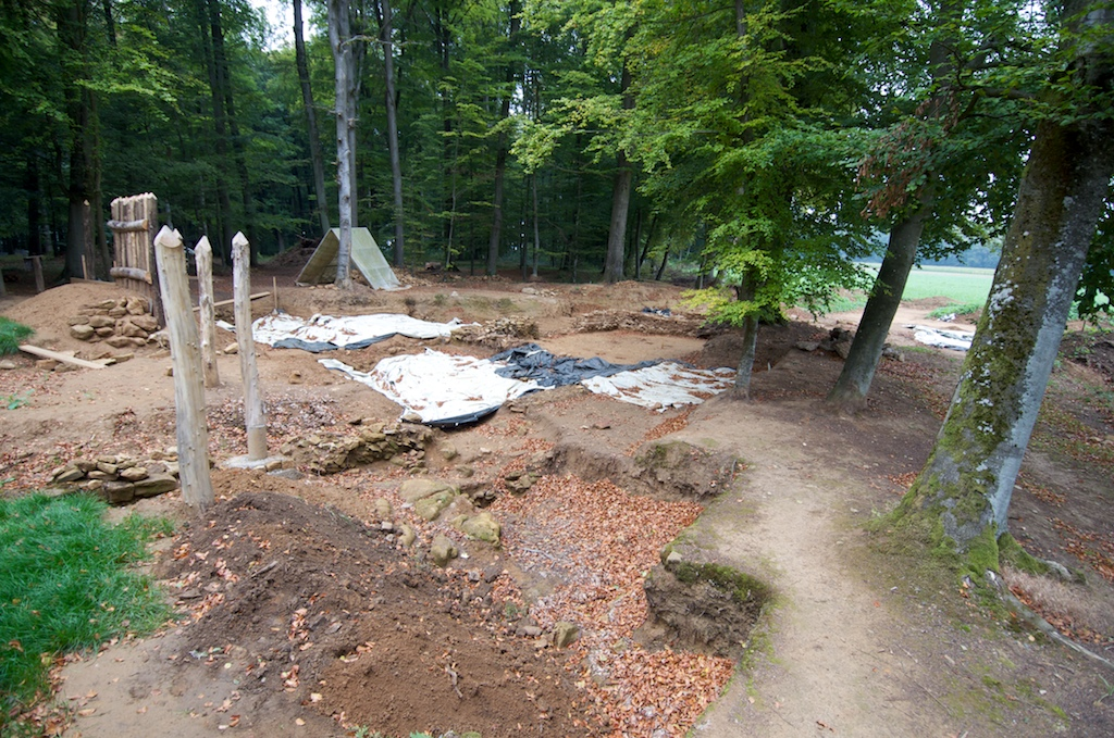 La villa romaine de Goeblange (Luxembourg)